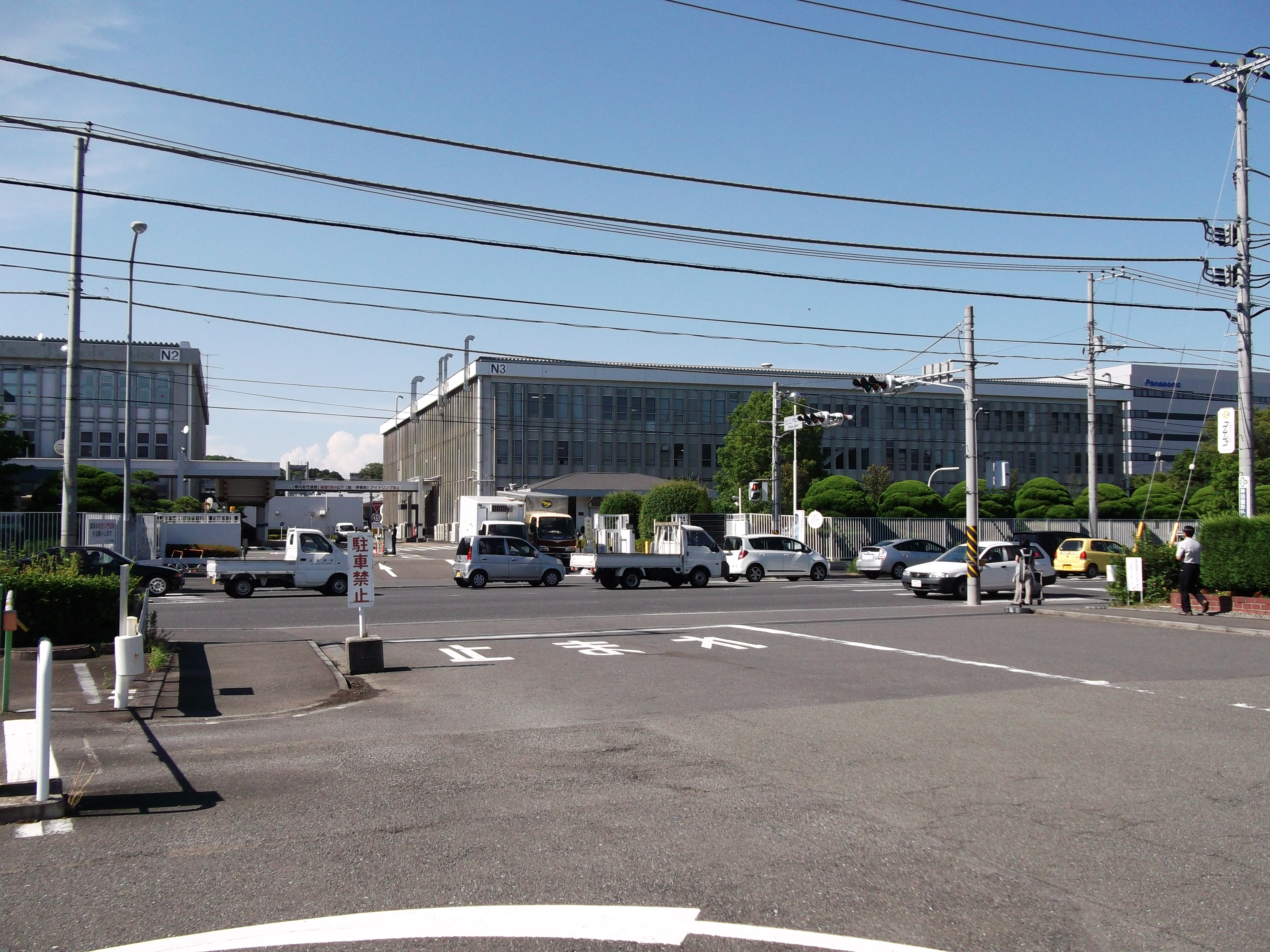 パナソニック横浜佐江戸事業場 パナソニックモバイルコミュニケーションズ本社